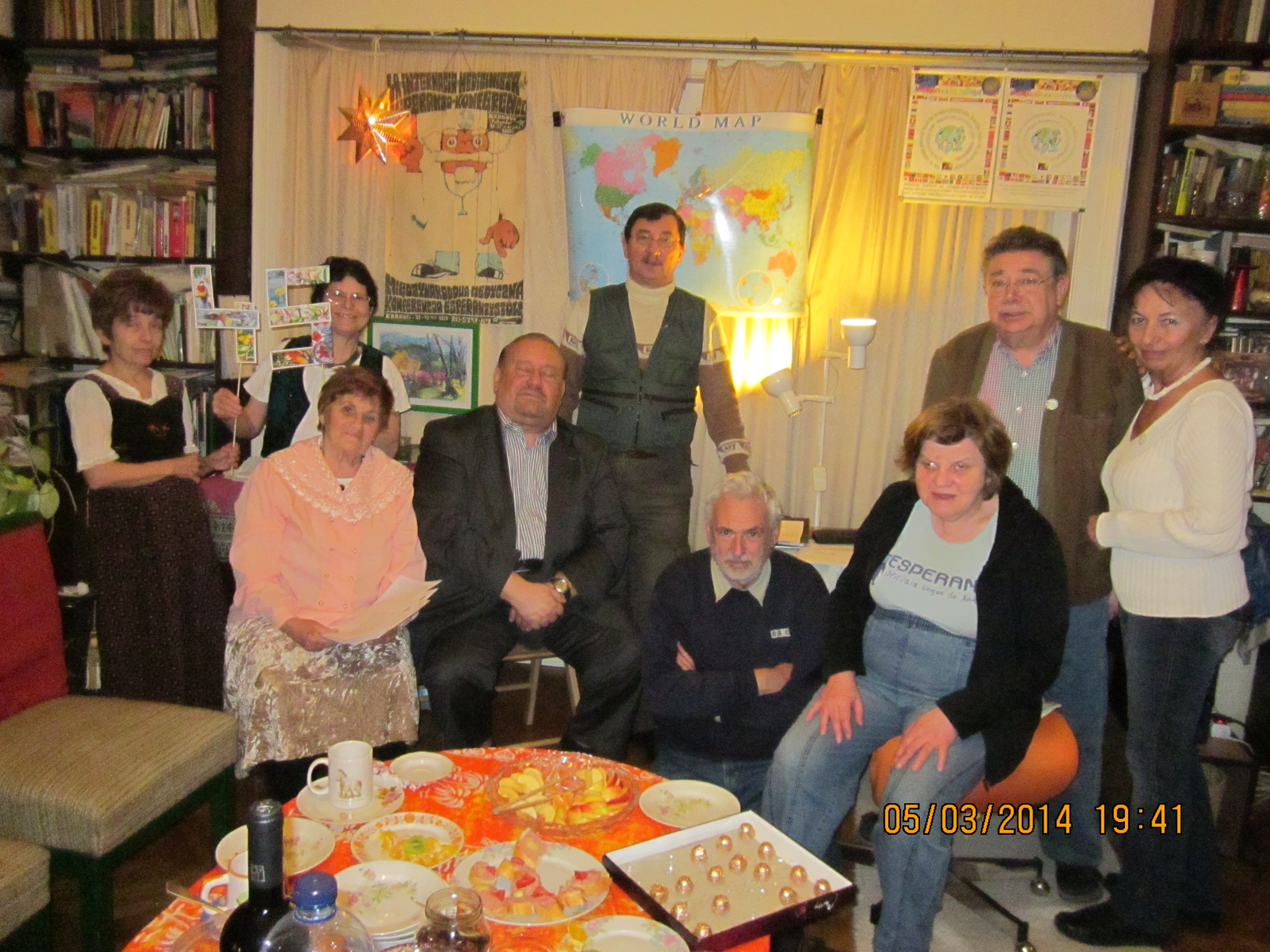 Budapesti Orvos Eszperantó Szakcsoport alapításának 45 ödik évfordulója.